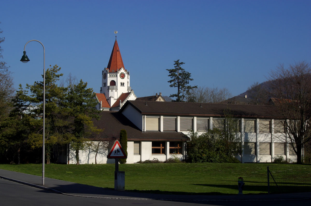 Reformierte Kirche in Weinfelden